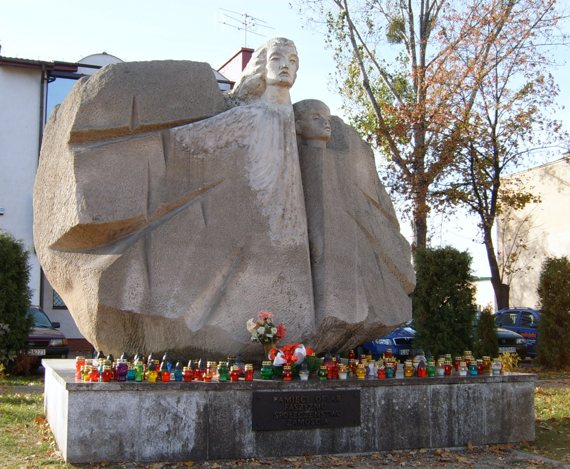 Pomnik Anioł Śmierci w Zamościu